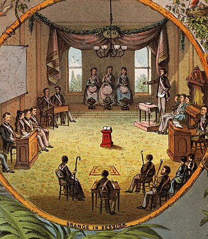 Grange meeting